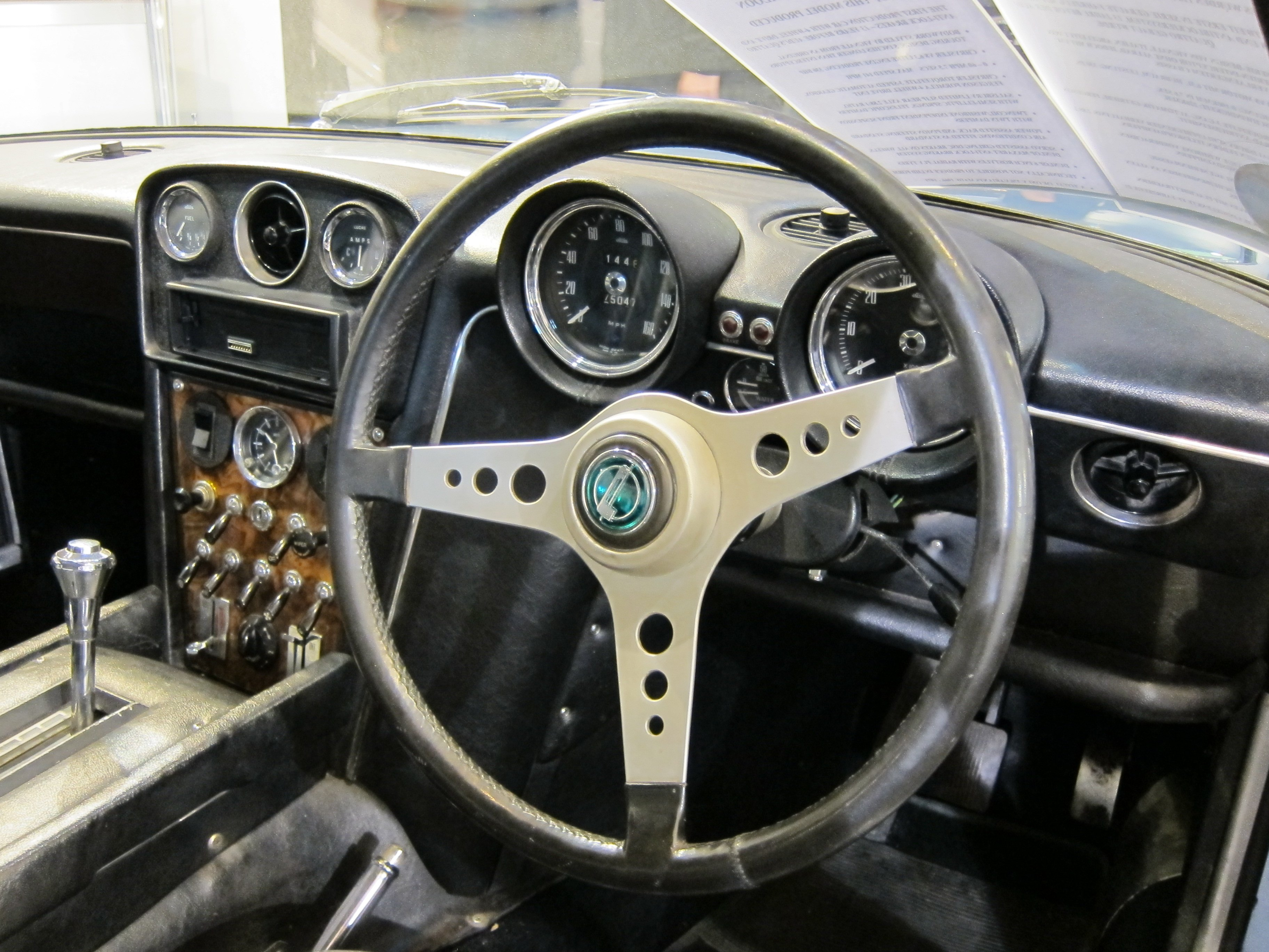 Techno Classica 2011